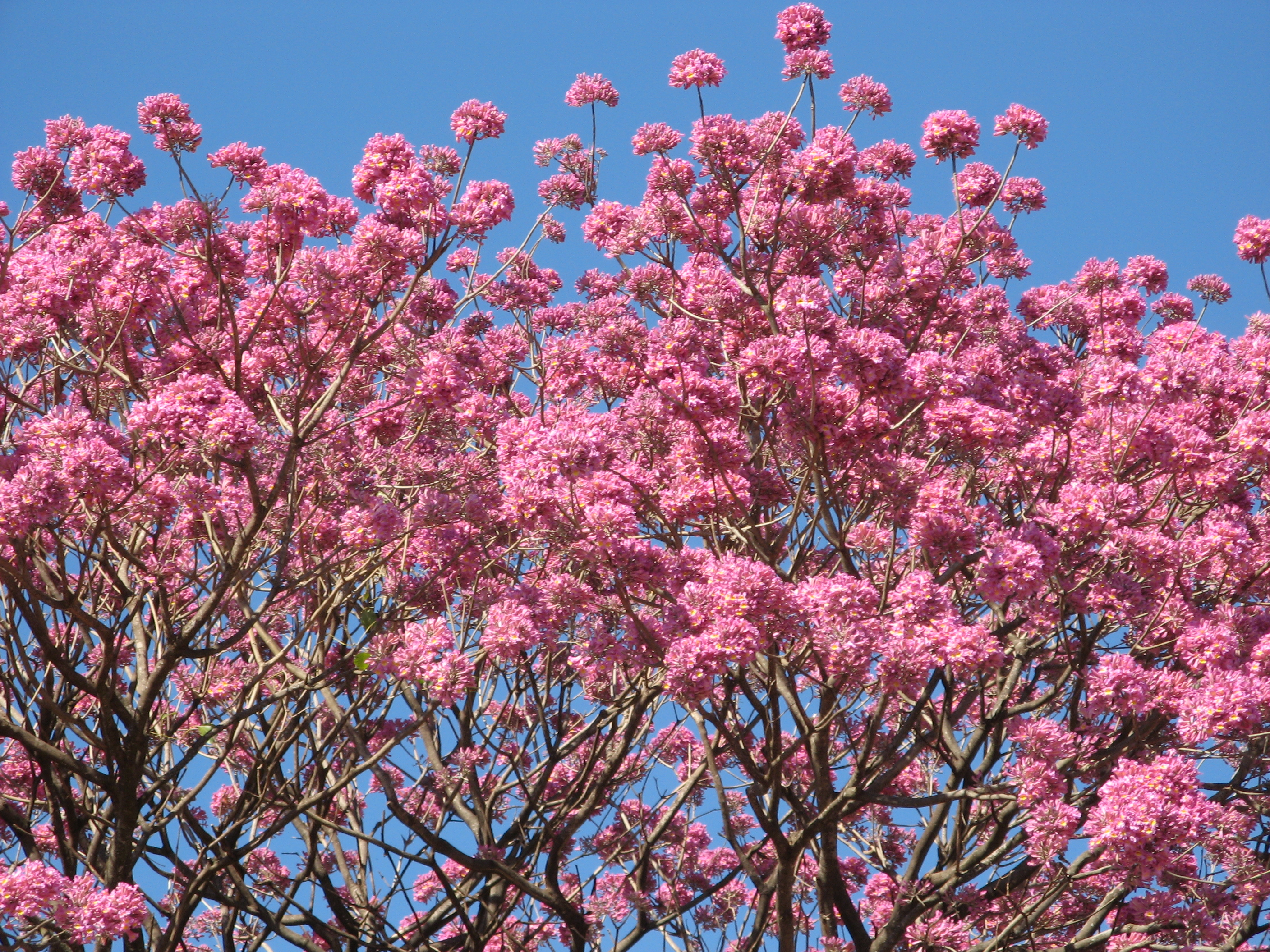 flores de ipe brazilia